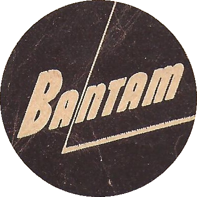 Logotipo de la marca de automóviles Bantam